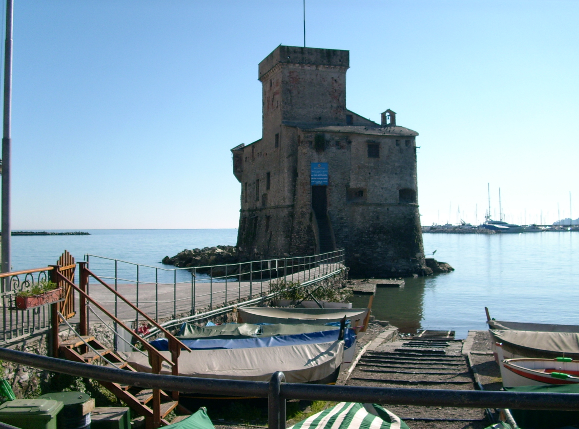 Castello di Rapallo